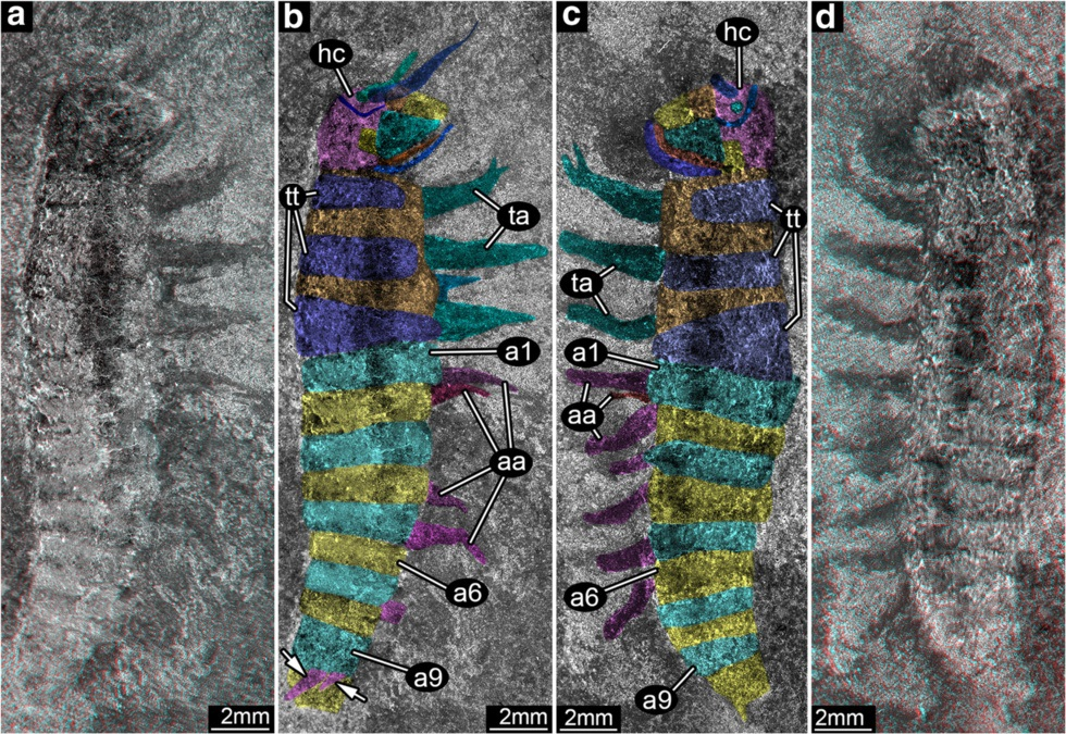 The external body structure of Srokalarva berthei. a and b are the part of specimen MCP-322; (c) and (d) are the counterpart to MCP-322, representing approximate mirror images of each other. a and d, Red–cyan stereo anaglyphs imaged under cross-polarized light. (For best visual results, use red–cyan glasses for viewing.) (b) and (c), Interpretative versions of (a) and (d), respectively. Colors delimit regions of the head, tergites, thoracic membranous regions, and appendages such as mouthparts, thoracic legs and abdominal prolegs. Arrows indicate abbreviated appendages on abdominal segment 9. Note that the proximal regions of the appendages are concealed under the body, and are not clearly marked. Abbreviations: aa, abdominal appendages; a1–a9, abdominal segments 1 to 9; hc, head capsule; ta, thoracic appendages; tt, trunk tergites